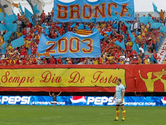 Tifo de la Bronca 2003 pour célébrer les 5 ans d'existence